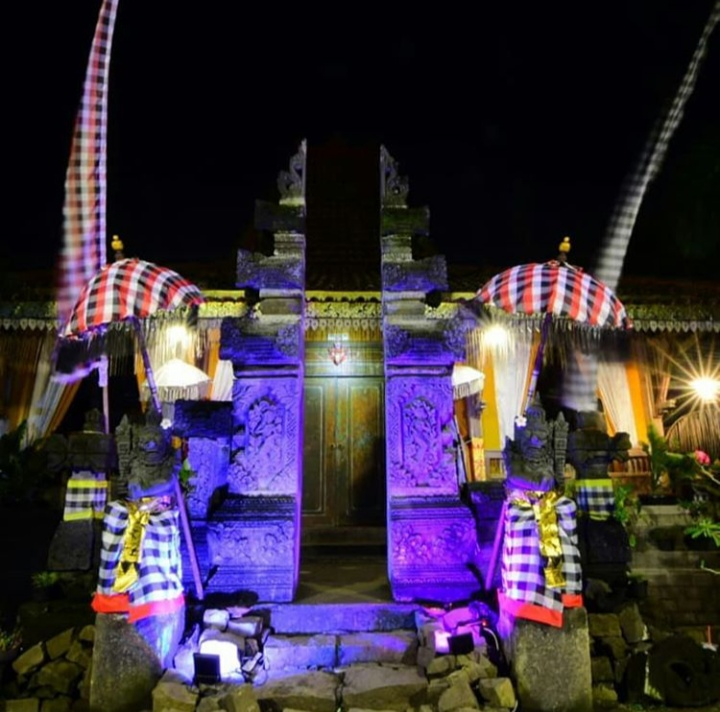 Basa Jawa: papan panggonan kanggo melestariakan budaya-budaya yang ada di grobogan. salah sawijine yaiku tari tayub.